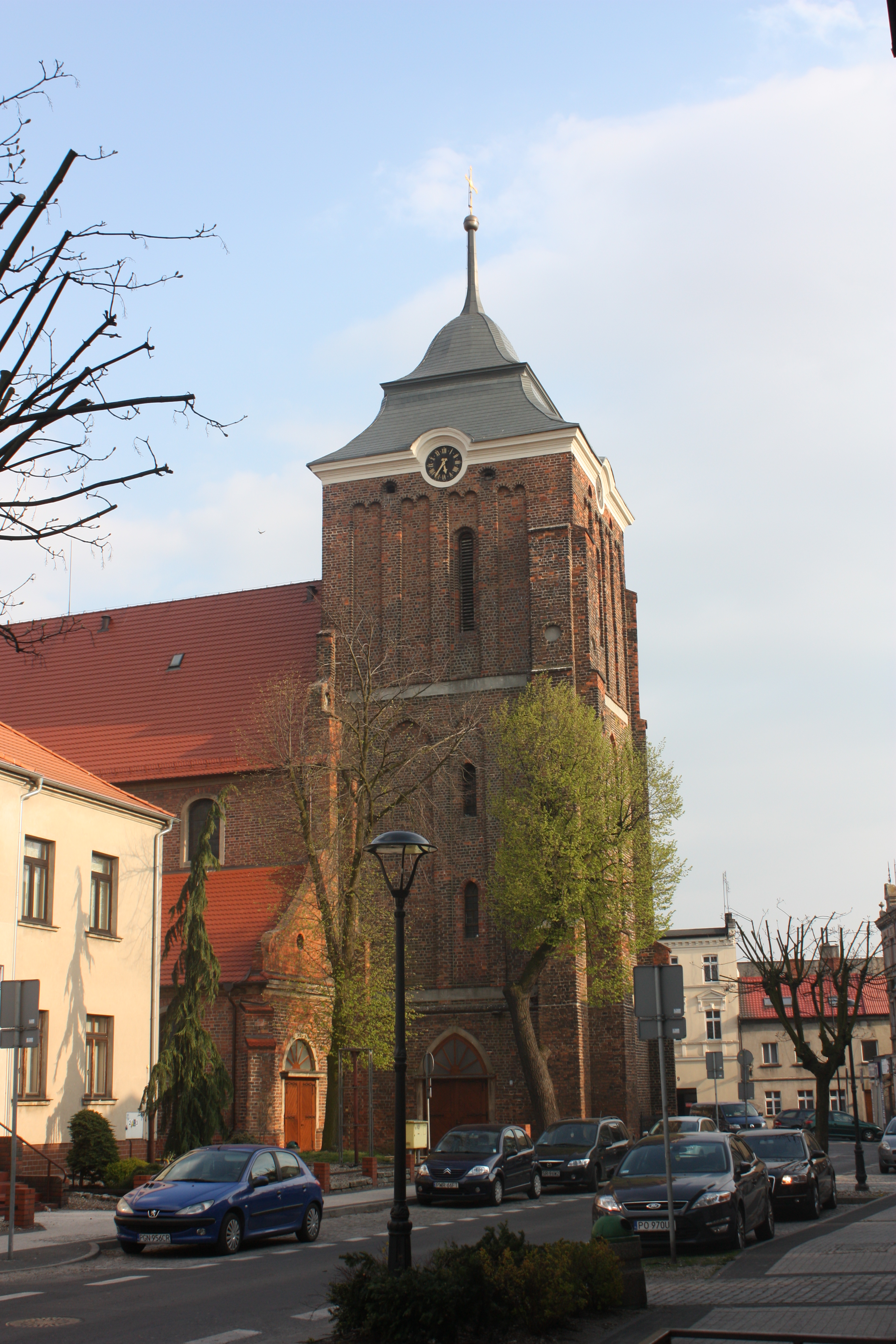 Kościół Wniebowzięcia NMP i św. Stanisława Biskupa we Wrześni. Widok od północnego zachodu (ul. Kościelna).